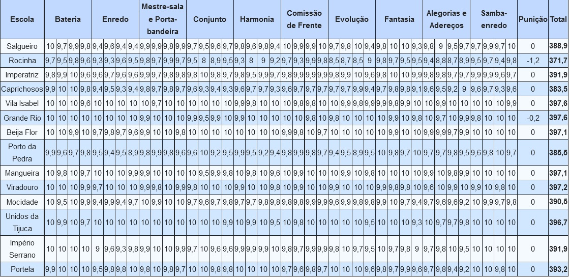 Resultados do Carnaval do Rio - 2006